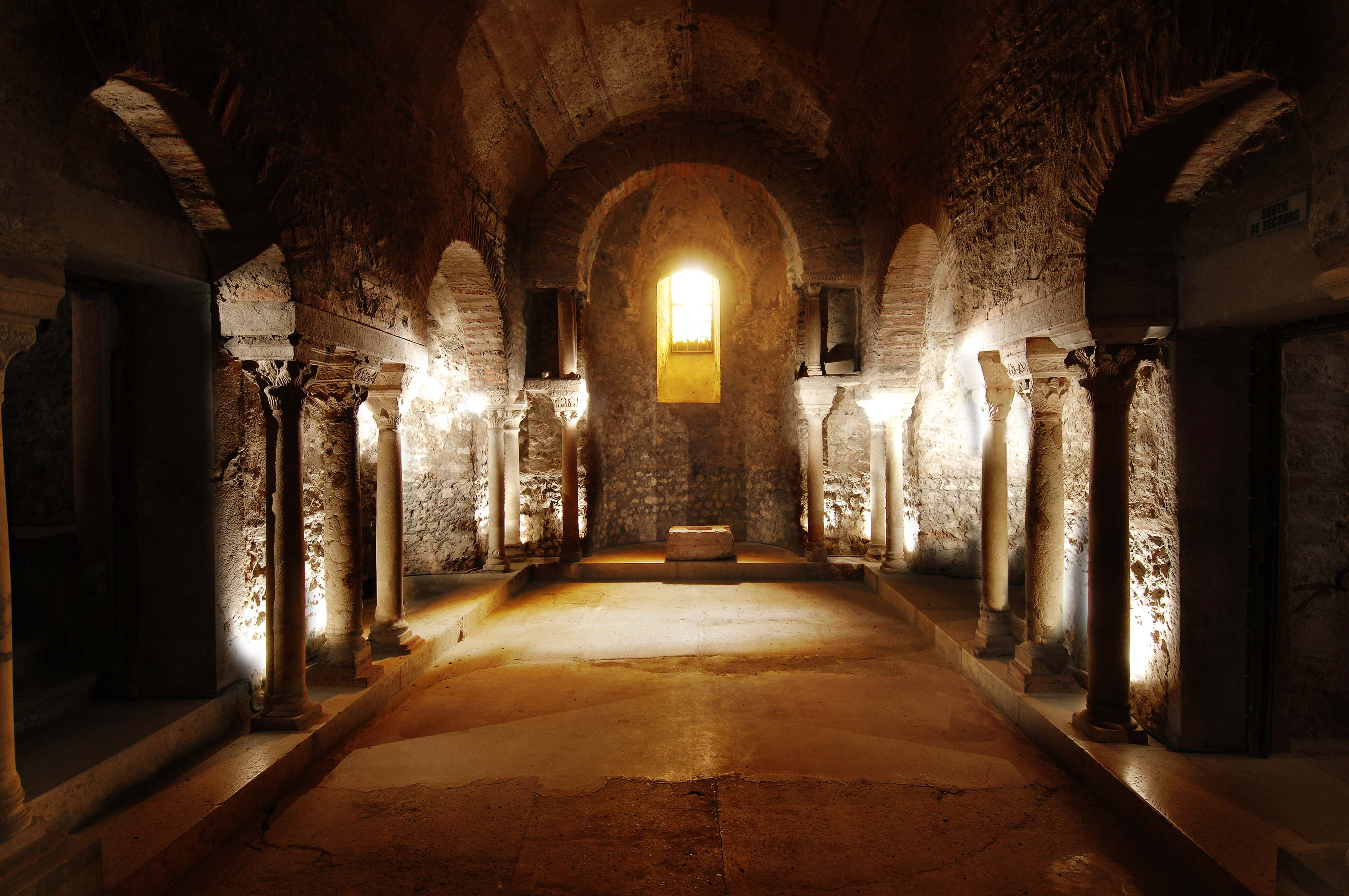 Musée archéologique de Grenoble, crypte Saint-Oyand, VIe siècle